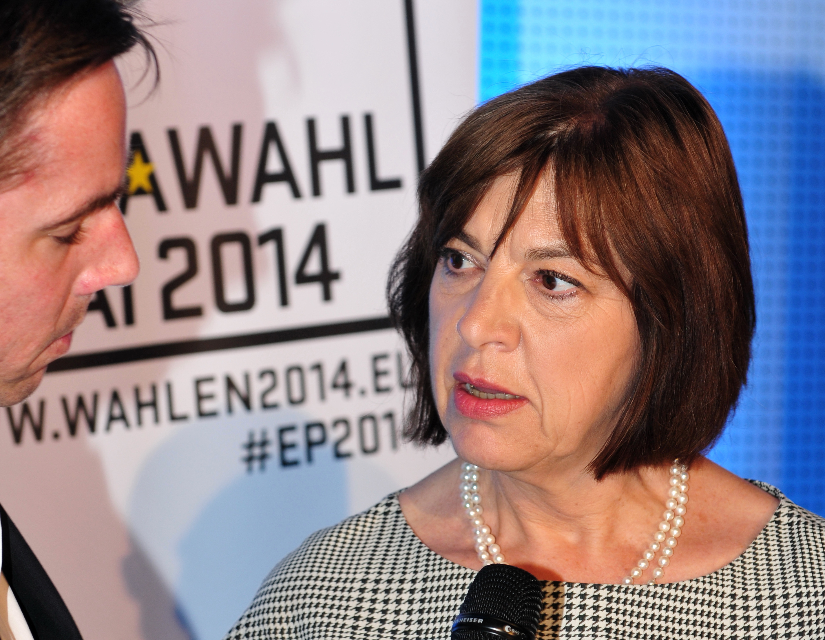 Europawahl 2014; Wahlstudio ZDF